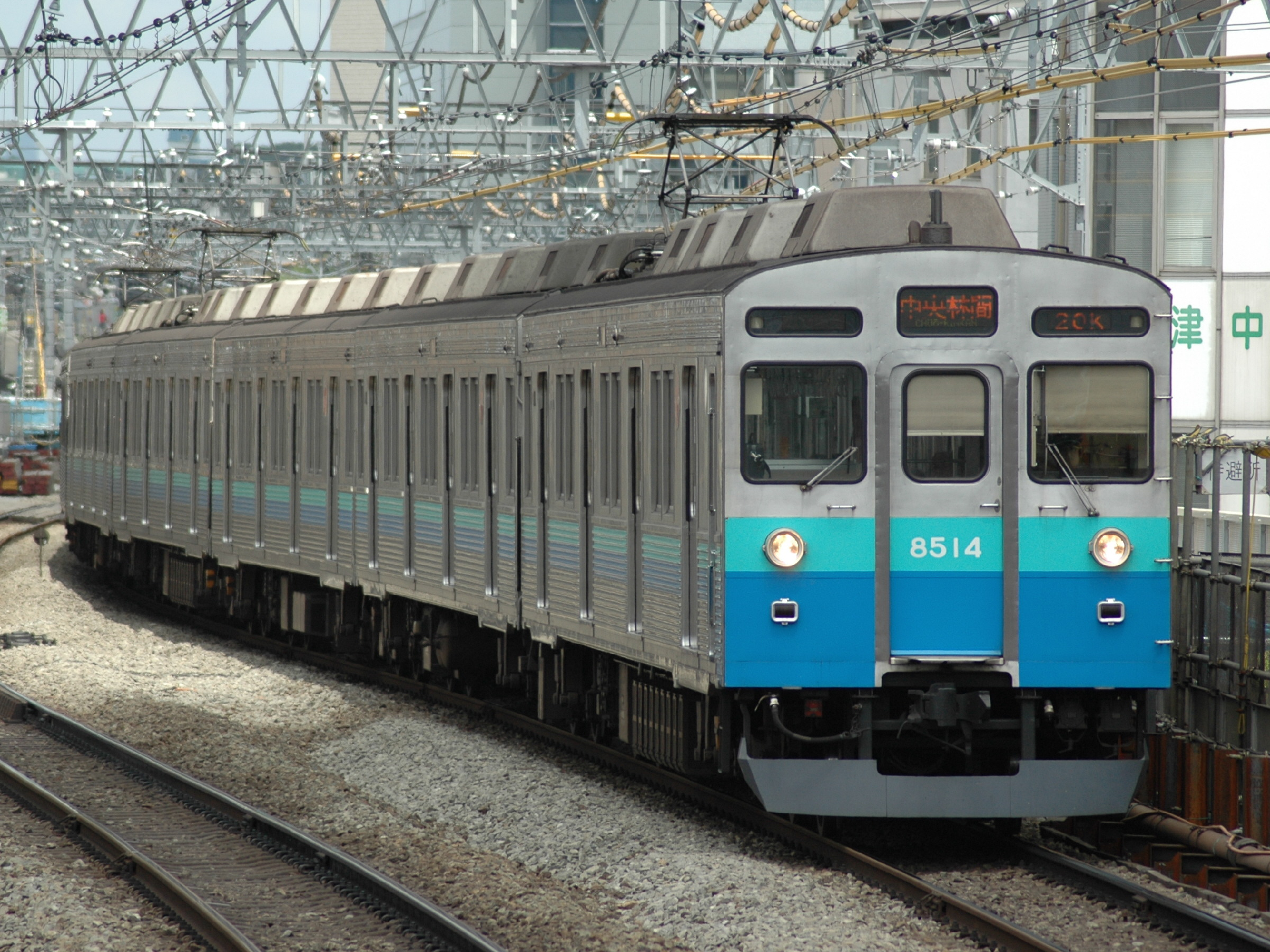 東急8500系8614F 伊豆のなつ号